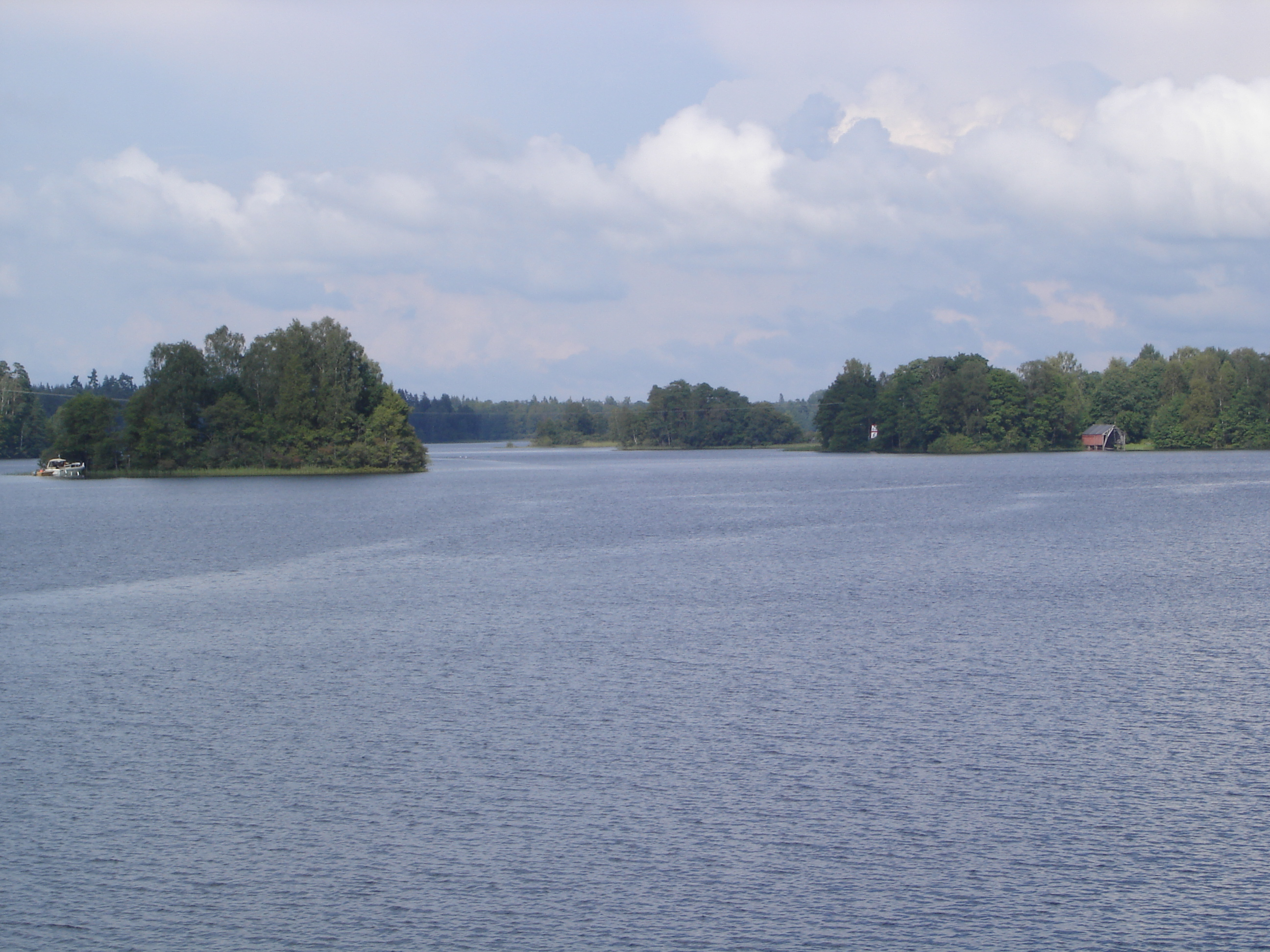 Der Bolmensee bei Piksborg